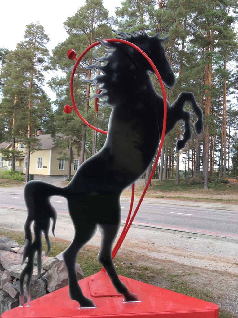 Tervetuloa!